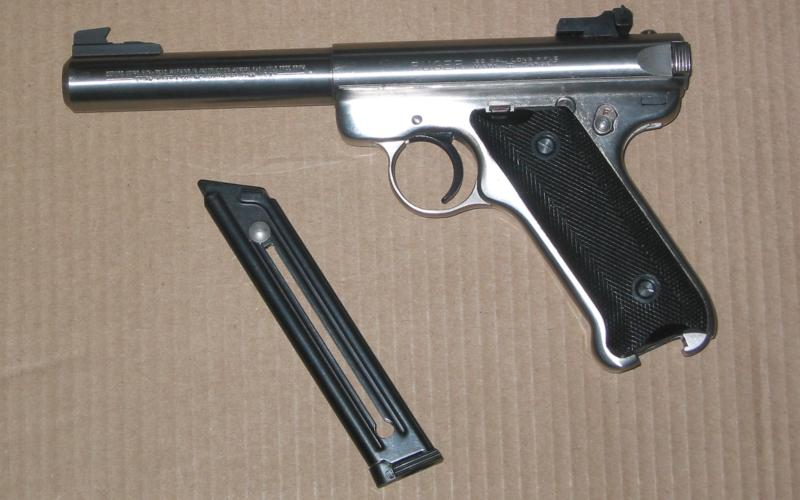 Ruger MK II target pistol